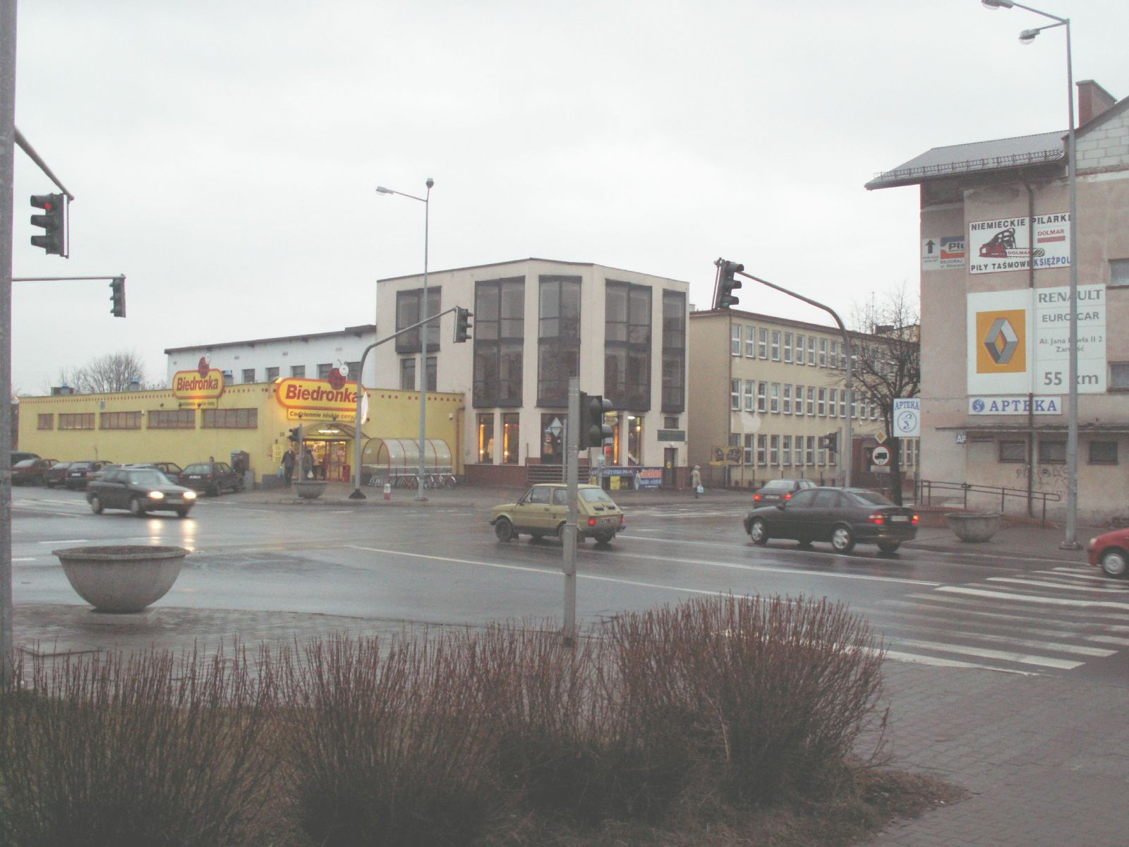 Biłgoraj - skrzyżowanie ul. Kościuszki i ul. Lubelskiej. Autor: "Piott" Data wykonania: 20-01-2007